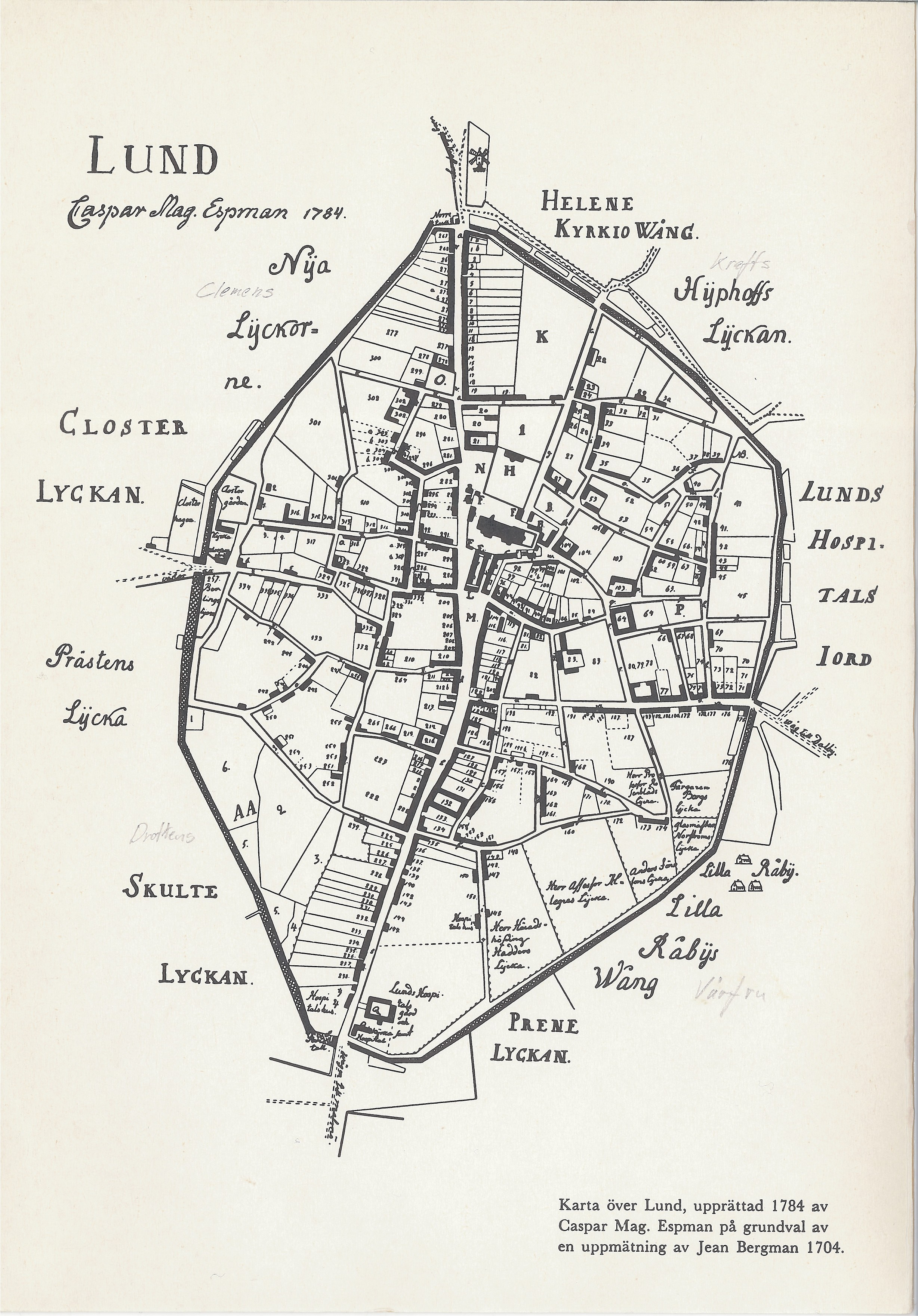 Caspar Magnus Espmans karta över Lund, med den tidens fastighetsindelning.